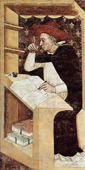 ritratti di domenicani